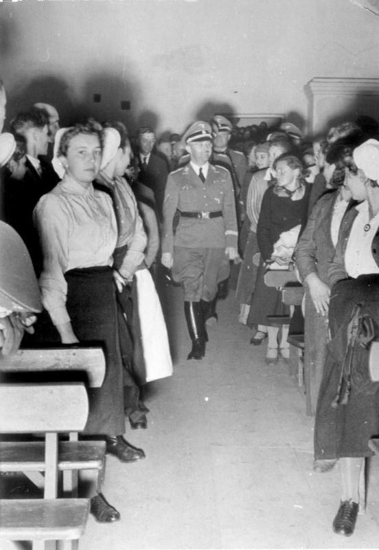 Himmler, Heinrich, beim Einzug in die Abend-Veranstaltung der Volksdeutschen in Halbstadt, 31.10.1942. Im Gebiet der Molotschna [Ukraine] waren ca. 84 DRK-Schwestern eingesetzt. Sie halfen, die Volksdeutschen zu betreuen.